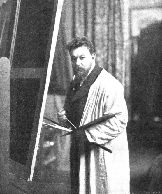 Joaquín Sorolla, obra del fotógrafo Christian Franzen, recogido en la revista española Alrededor del Mundo.